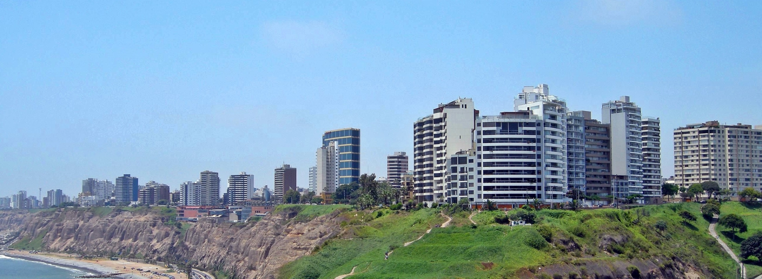 Lima, Peru